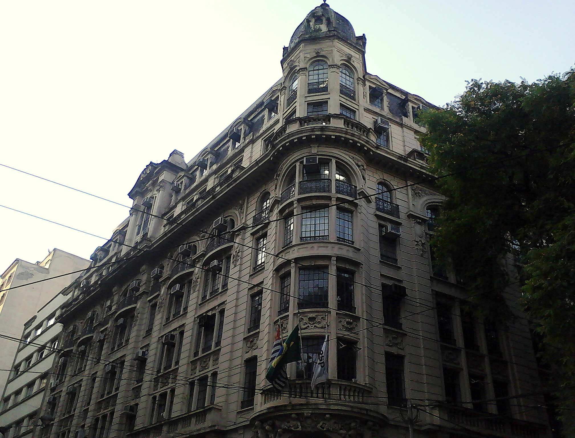 Centro de Documentação e Memória da Universidade Estadual Paulista "Júlio de Mesquita Filho", localizado na Praça da Sé, esquina com R. Benjamin Constant, centro de São Paulo, SP, Brasil.